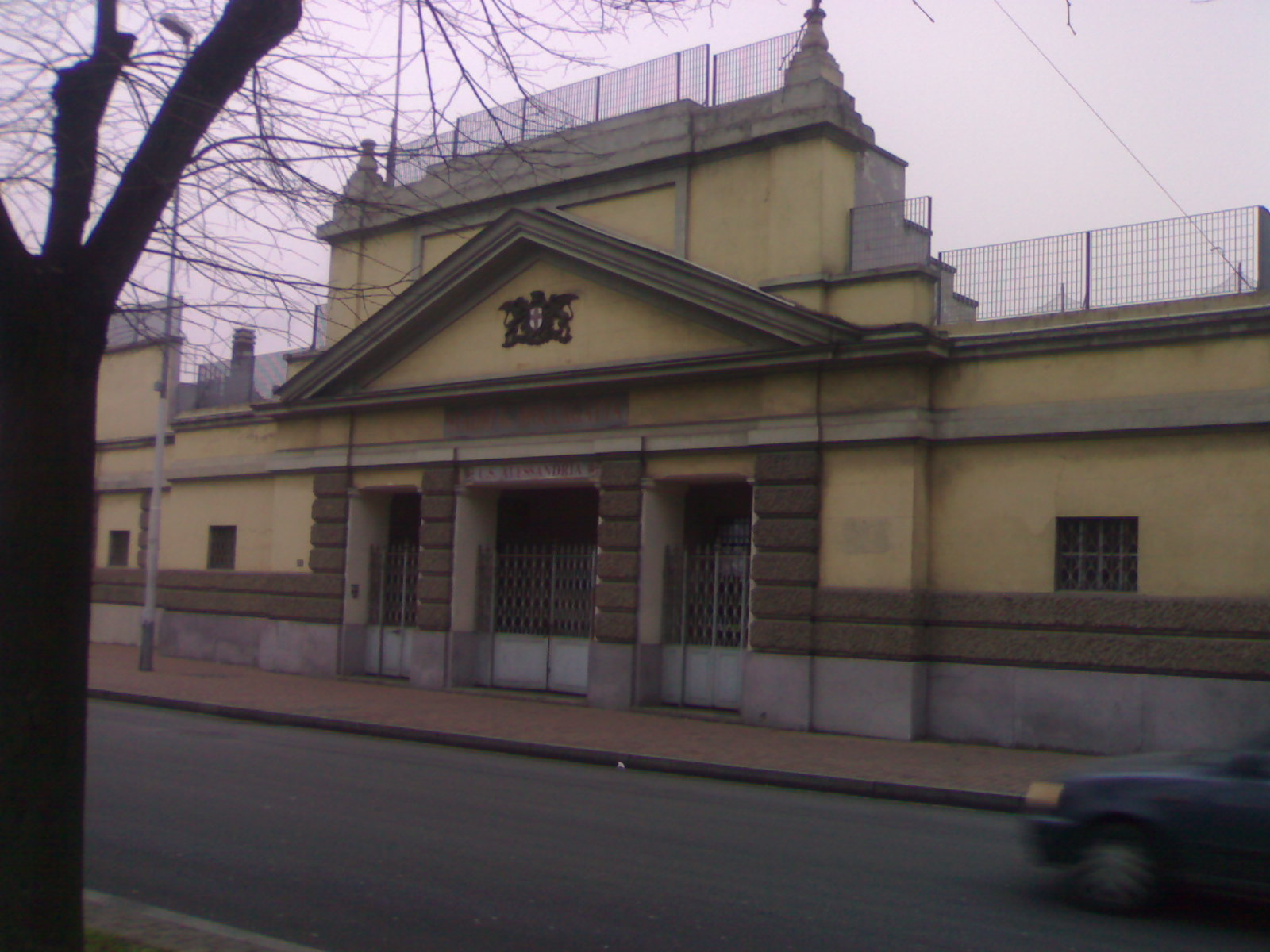 Stadio "Giuseppe Moccagatta", Alessandria, Italy